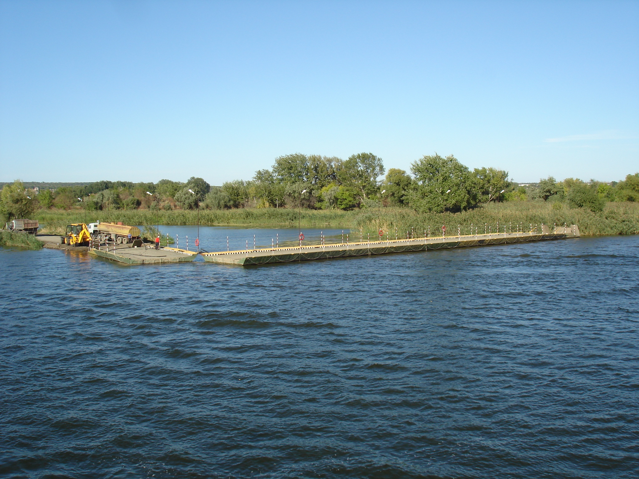 Каменск-Шахтинский, понтонная переправа (разведена для пропуска судна)